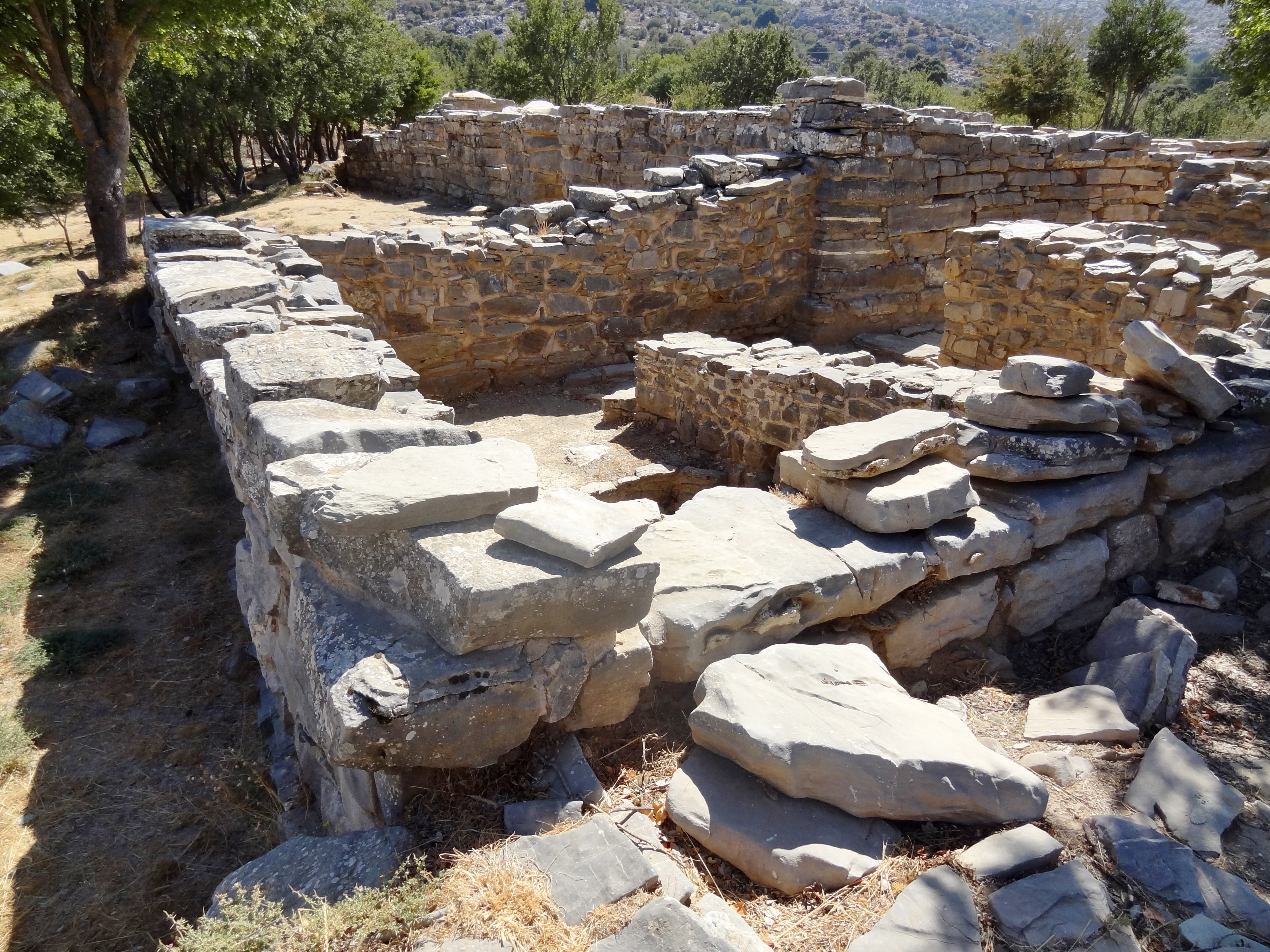 Ausgrabungsstätte von Zominthos, Gemeinde Anogia, Kreta, Griechenland